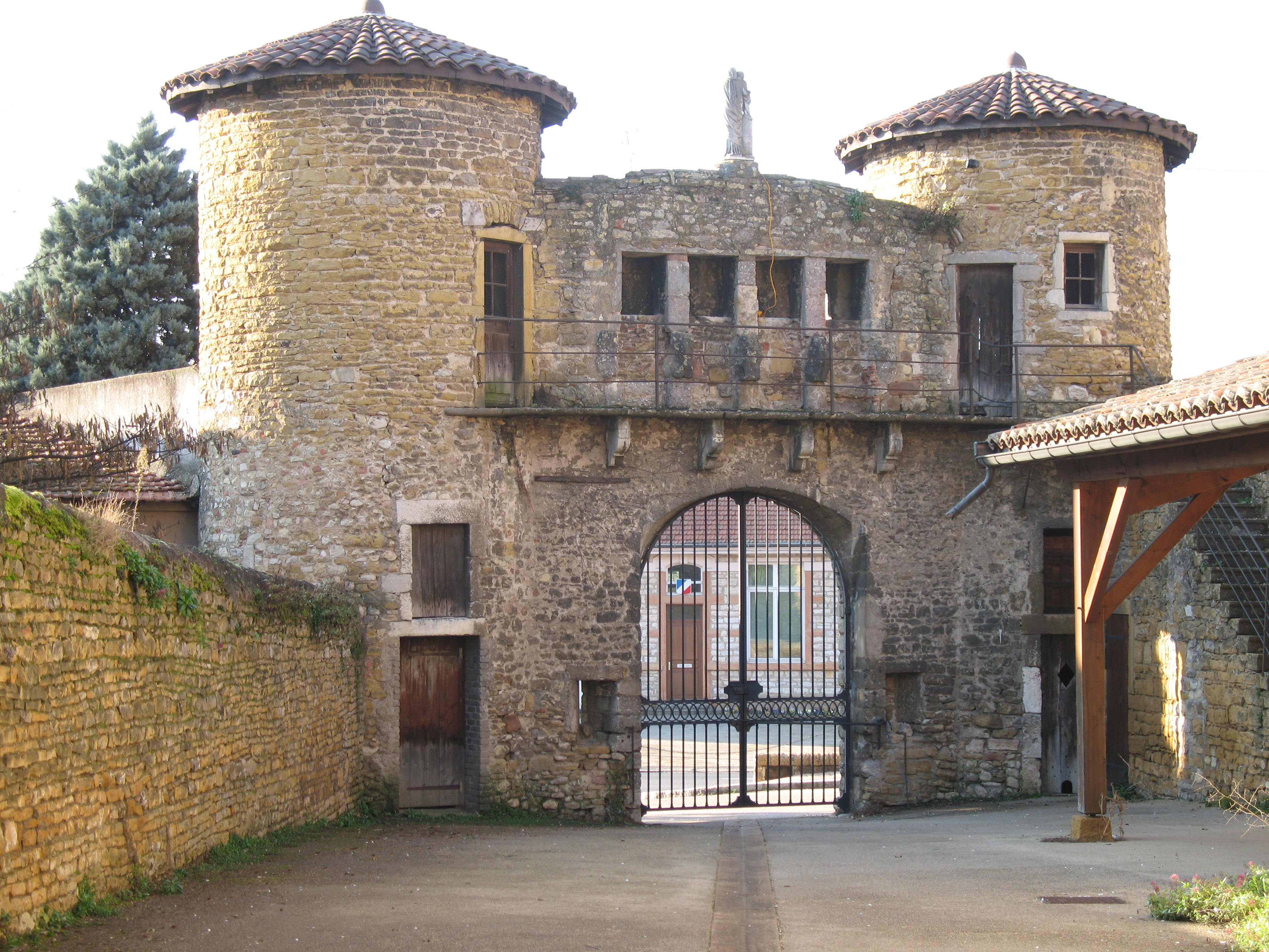 Château de Lissieu dans le Rhône